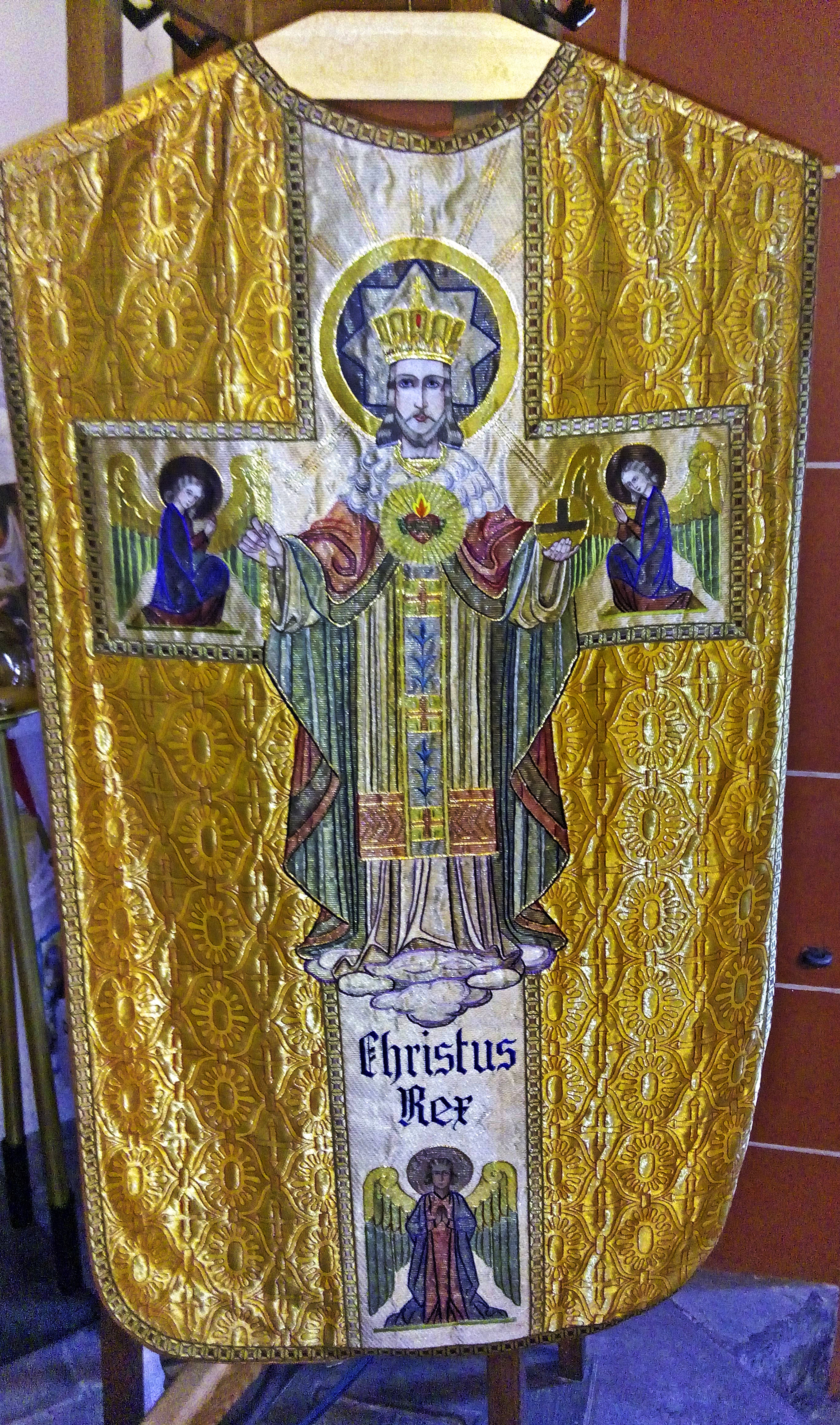 Christ König Mess-Kasel, Frankenthal-Mörsch, um 1930